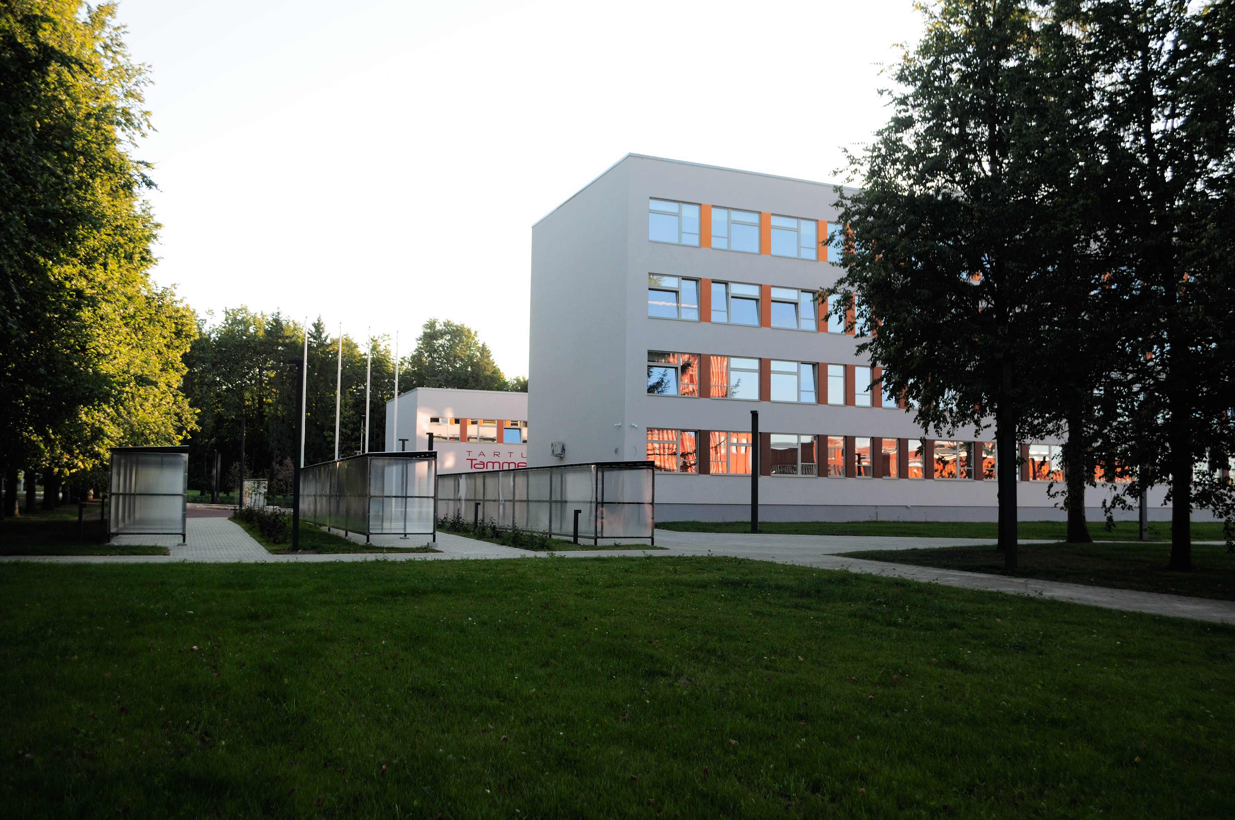 Tartu Tamme Gümnaasium - Nooruse 9